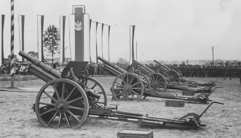 Uroczyste przekazanie Wojsku Polskiemu haubic wz. 14/19 wykonanych bezpłatnie jako dar pracowników Zakładów Południowych w Stalowej Woli. Na zdjęciu dar załogi, czyli haubice. 3 maja 1939 roku.